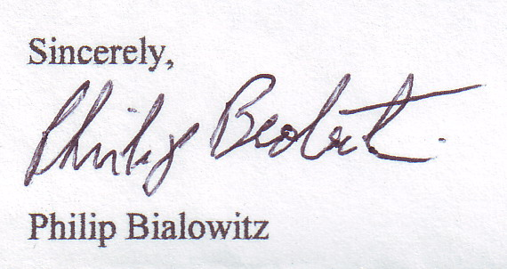 Unterschrift Philip Bialowitz; eigener Scan aus einem persönlichen Brief vom 10. August 2009 an den Autor (im Besitz des Autors)